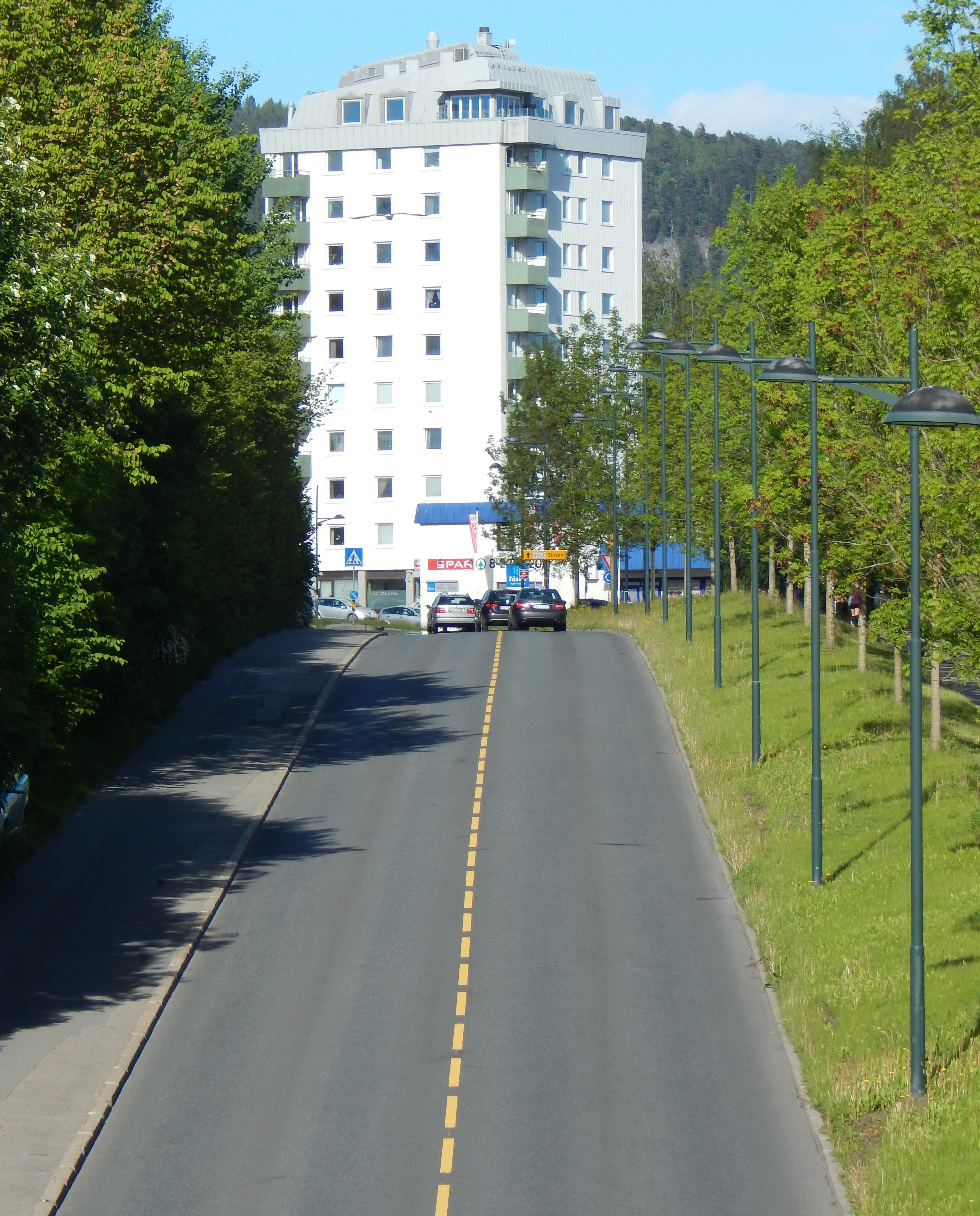 Kaj Munks vei vestover fra Berg mot Tåsenkrysset